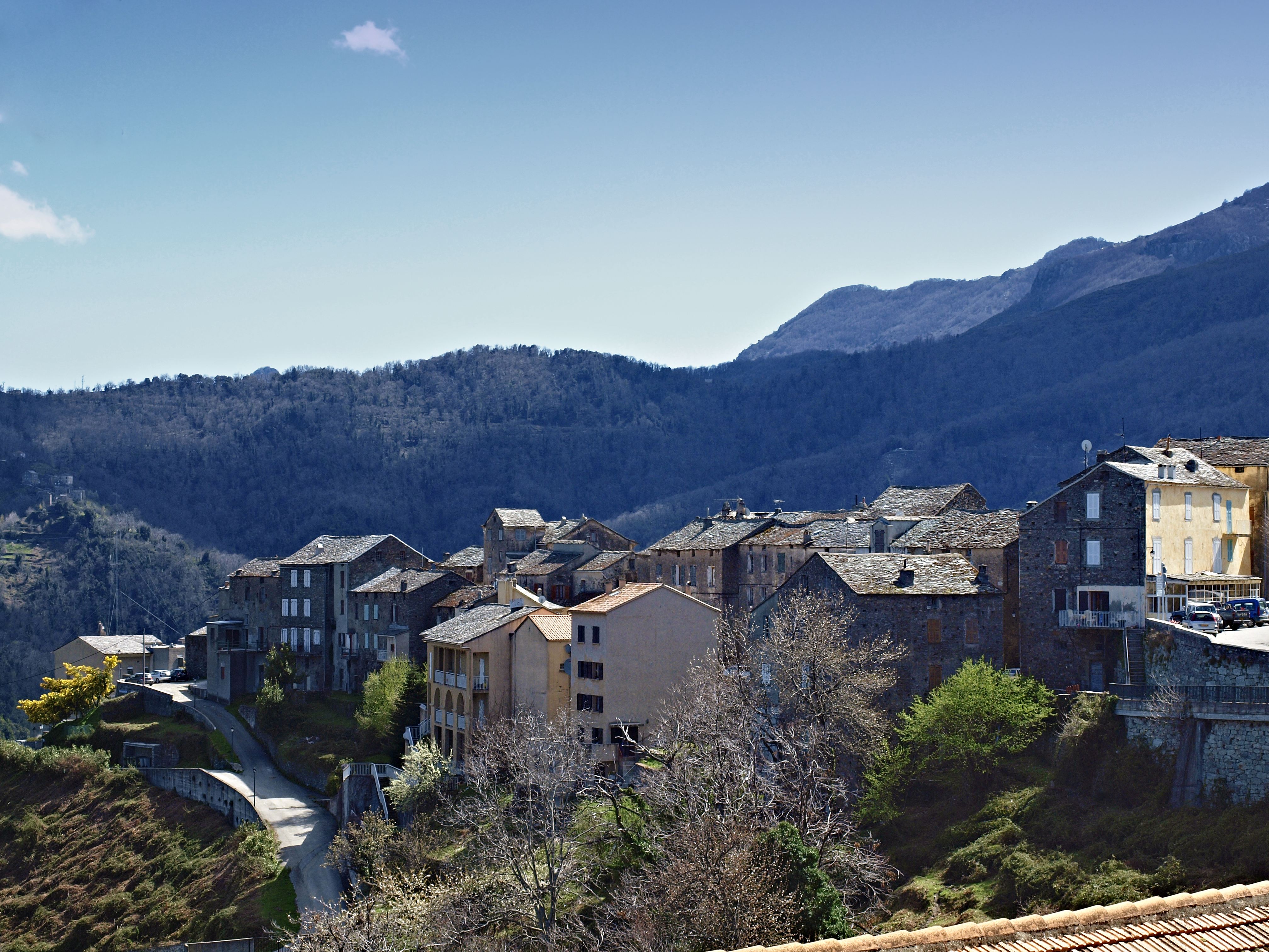 Piedicroce (Corsica) - Vue du village depuis l'église